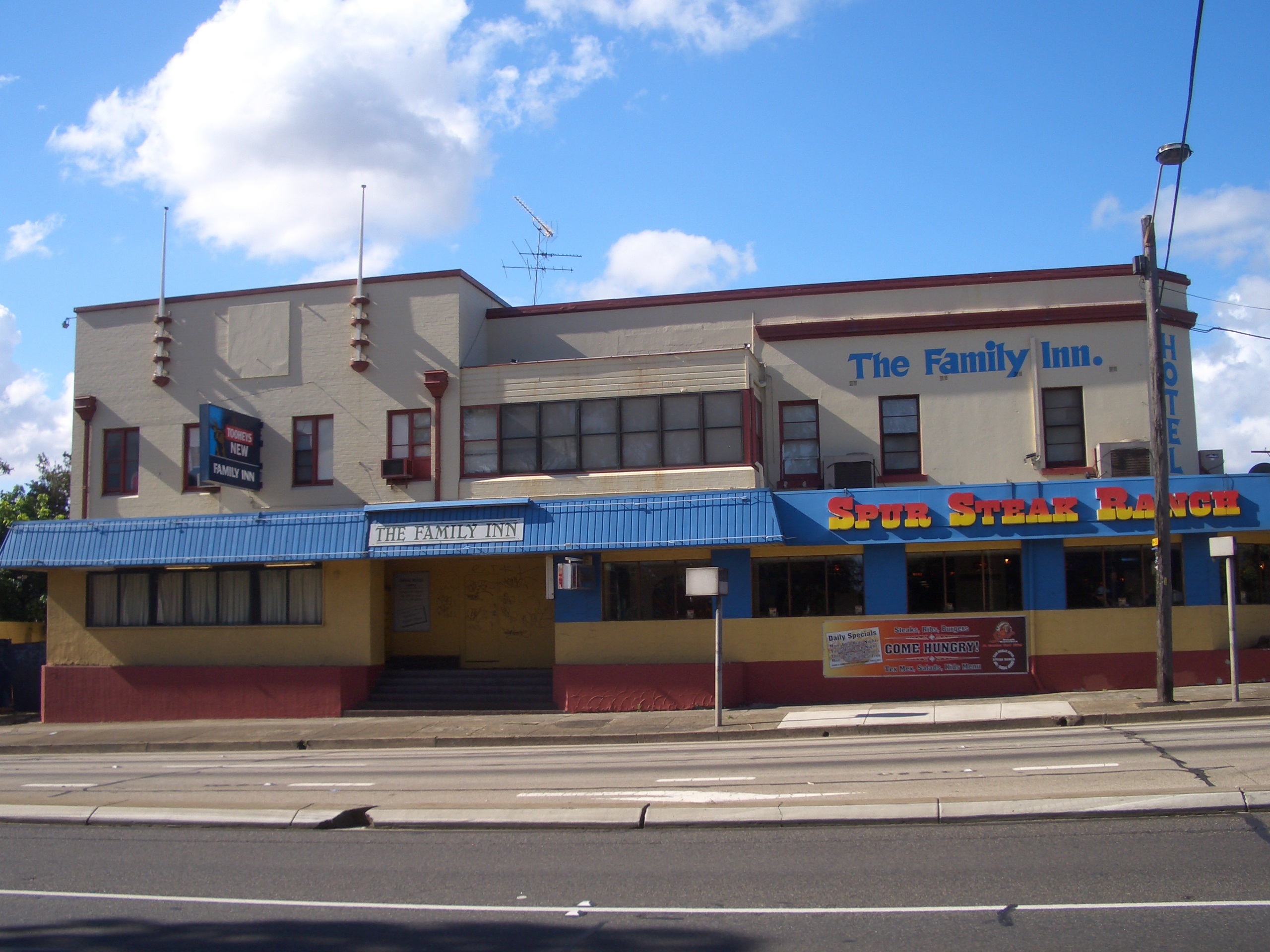 Rydalmere pub, Victoria Road